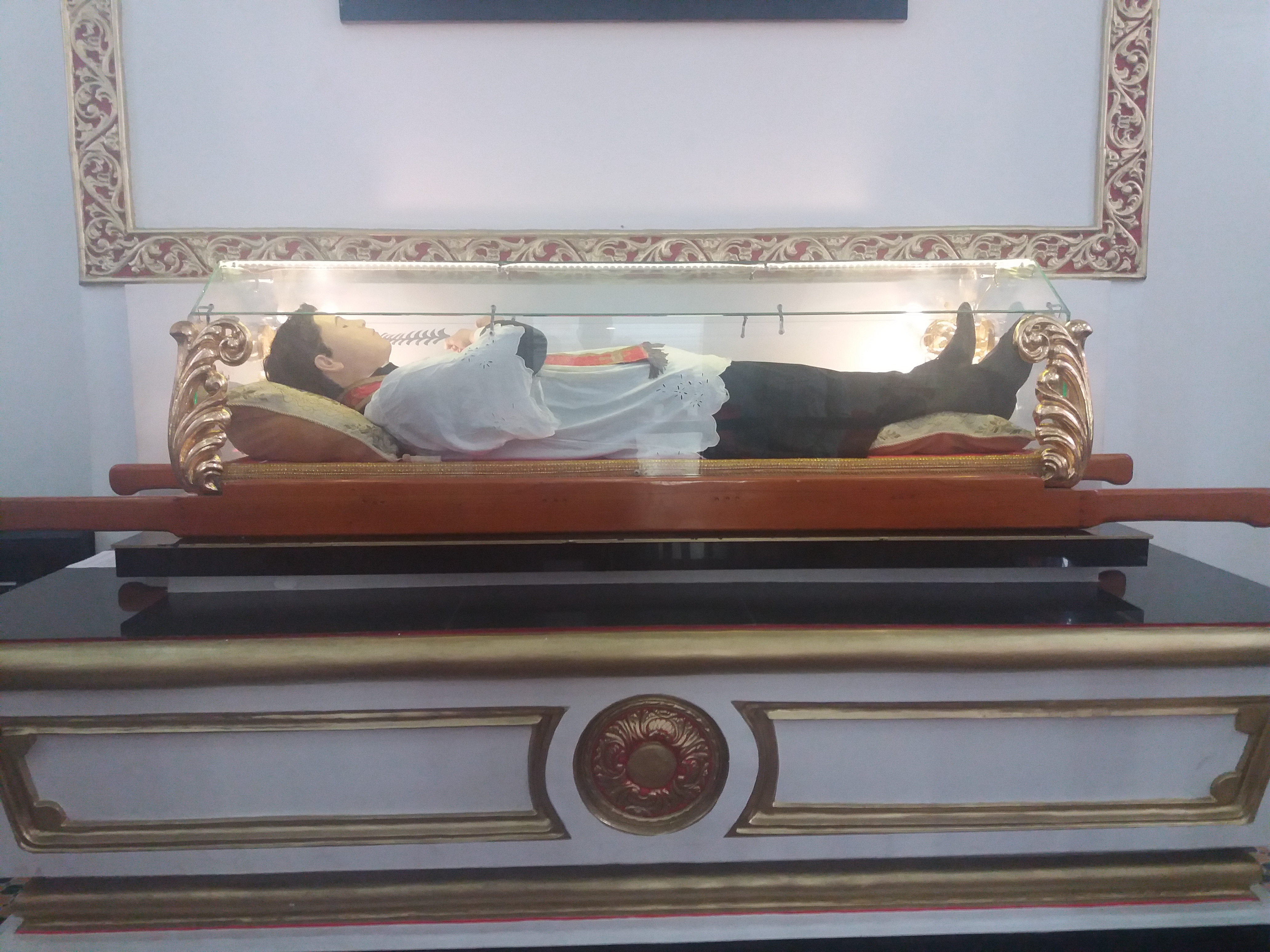 Imagen tomado al interior de la capilla, destinada a su veneración.